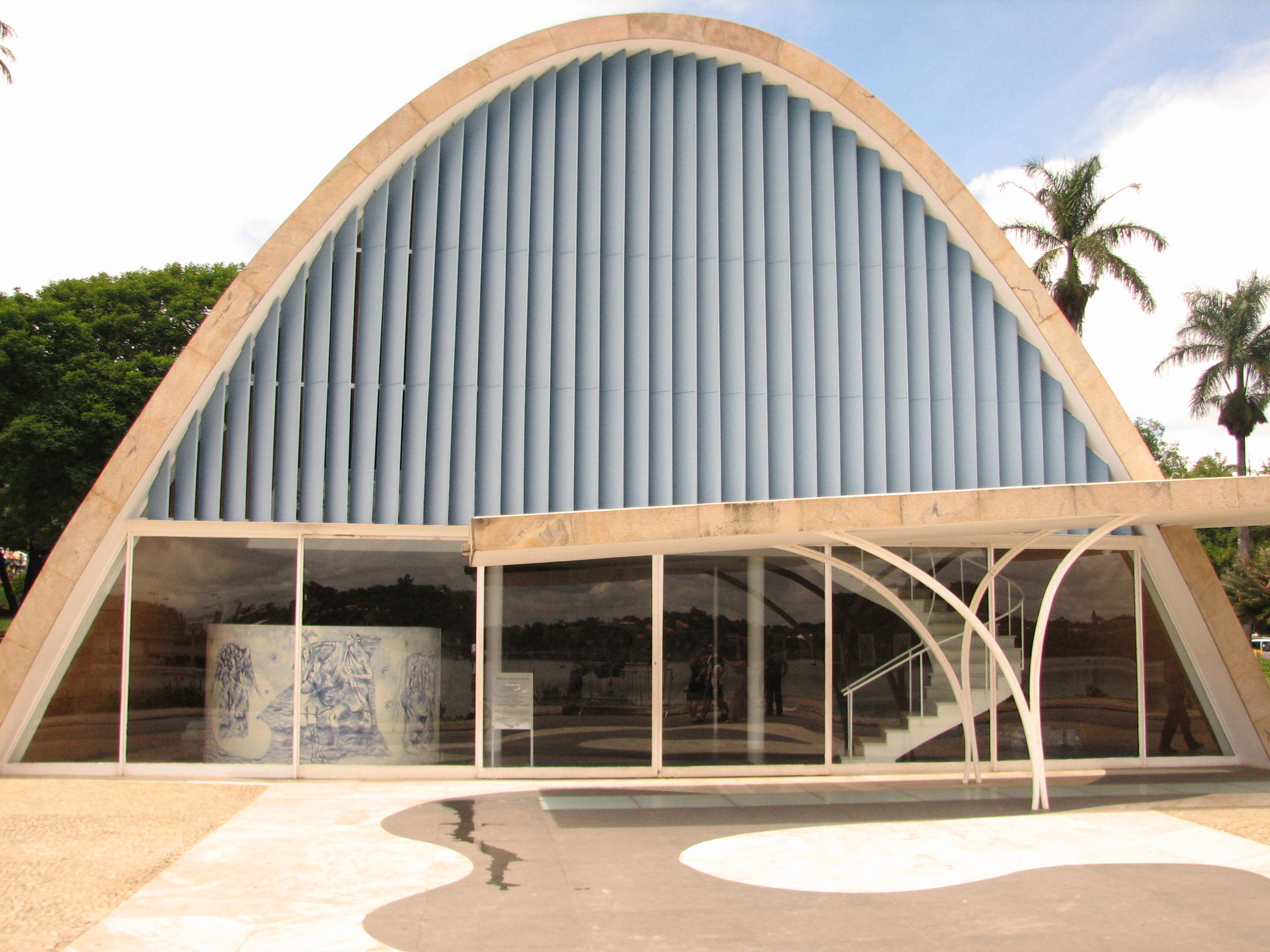 Belo Horizonte - Igreja da Pampulha